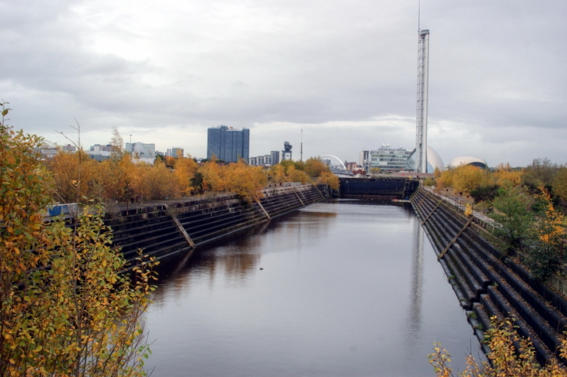 013 Govan Docks